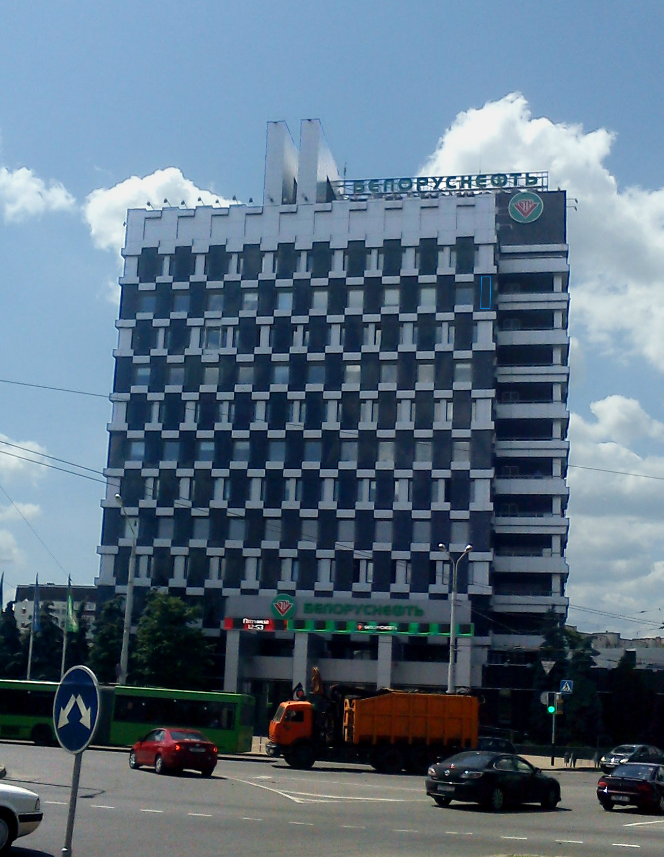 Главное здание государственного производственного объединения «Белоруснефть» в Гомеле.